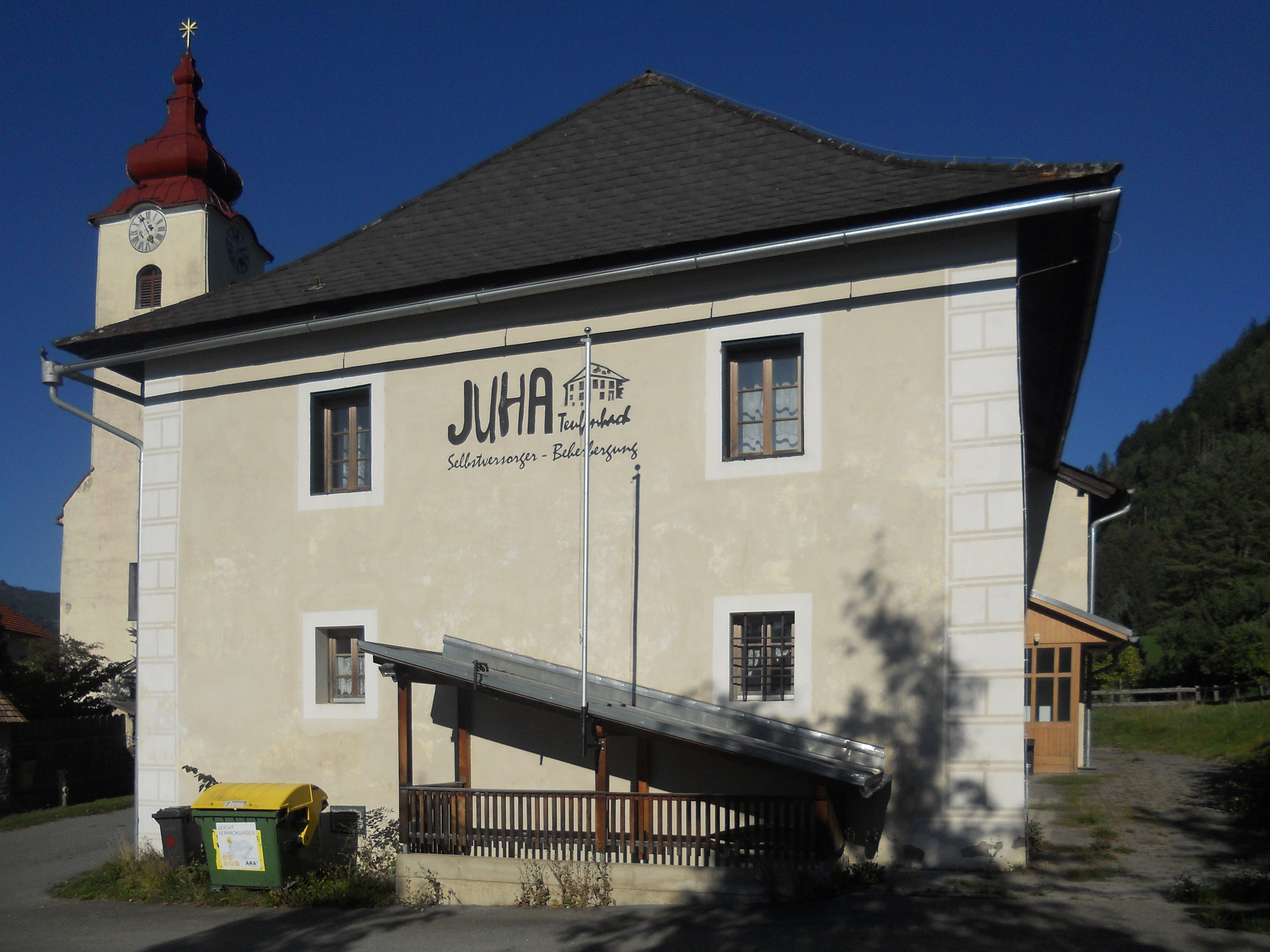 Pfarrhof/ Gästehaus